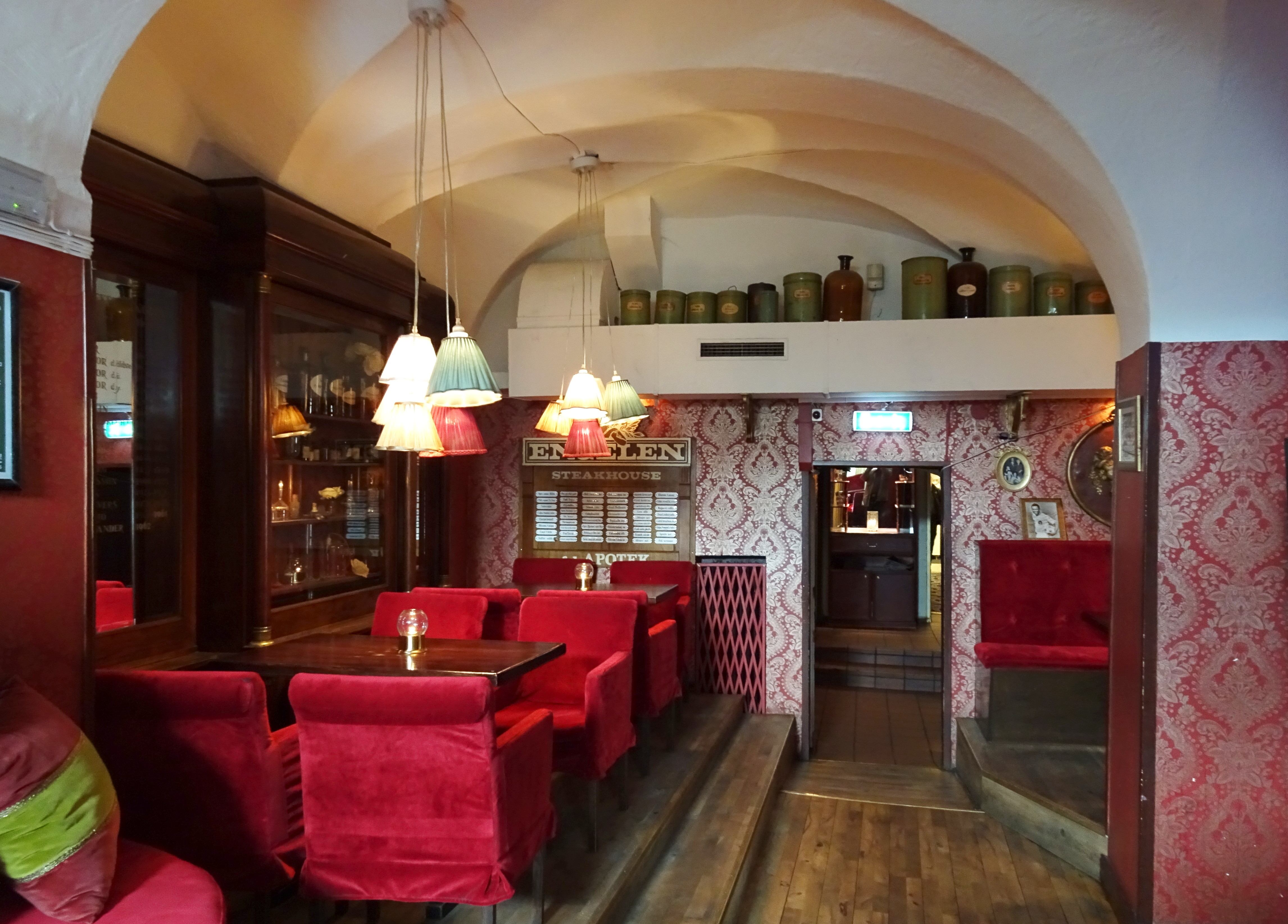 F.d. Apoteket Ängelen, nu restaurang